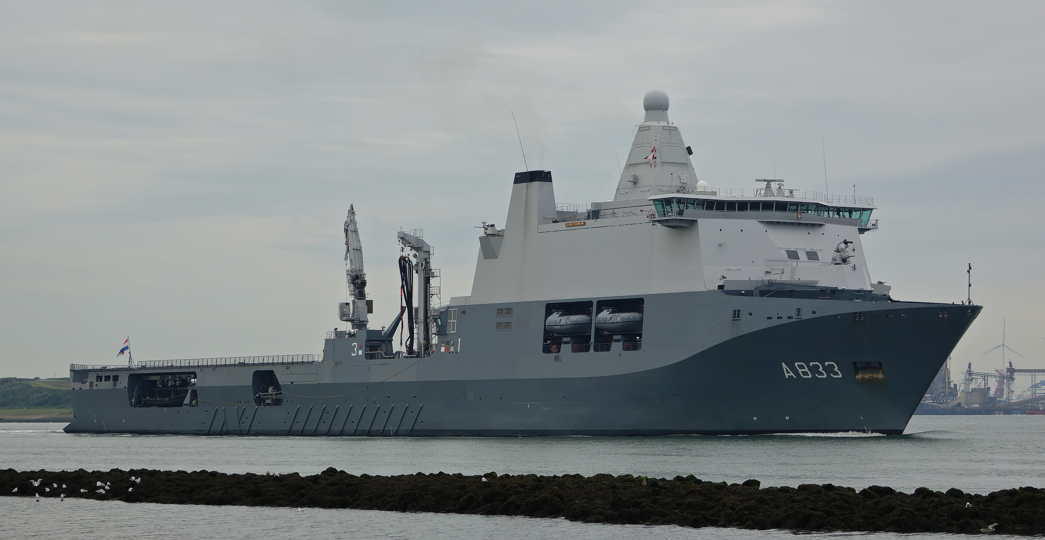 Nieuwe Waterweg 4-9-2017